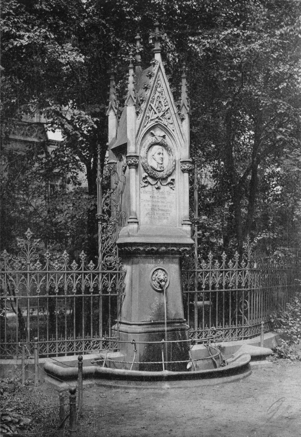 Breslau, Johann Friedrich Knorr Denkmal.